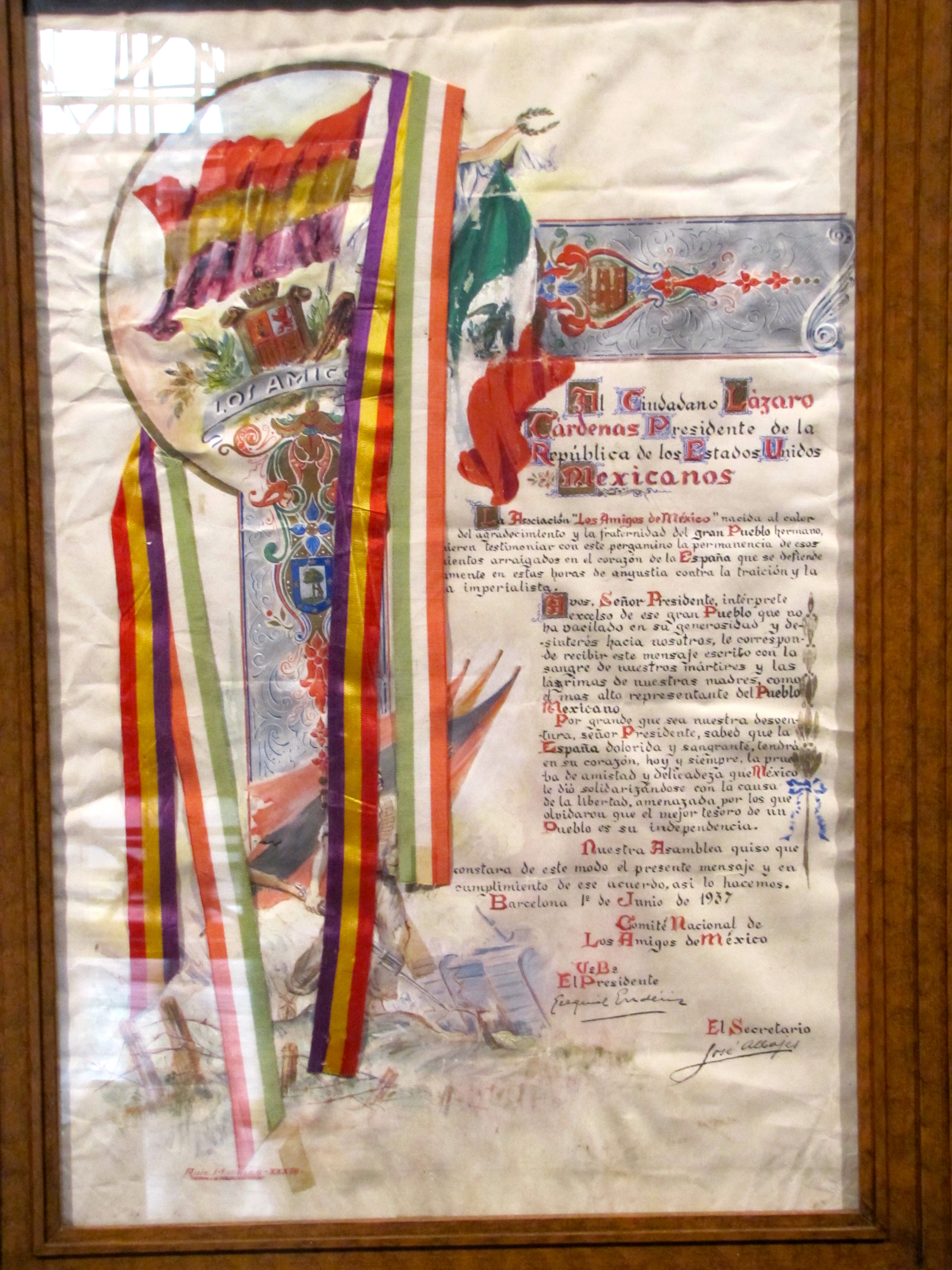 Diploma de "La Asociación de los amigos de México" a Lázaro Cárdenas, presidente de México. Centro Lázaro Cárdenas y Amalia Solórzano.